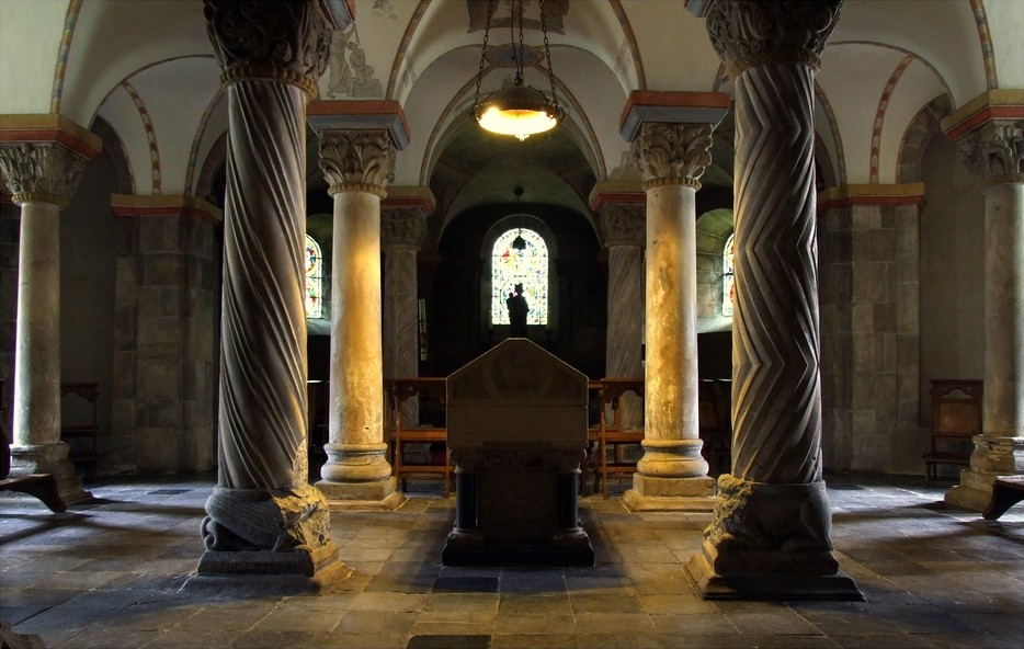 Crypte onder de kerk van de abdij Rolduc waar zich het (vermeende) gebeente van Ailbertus van Antoing bevindt